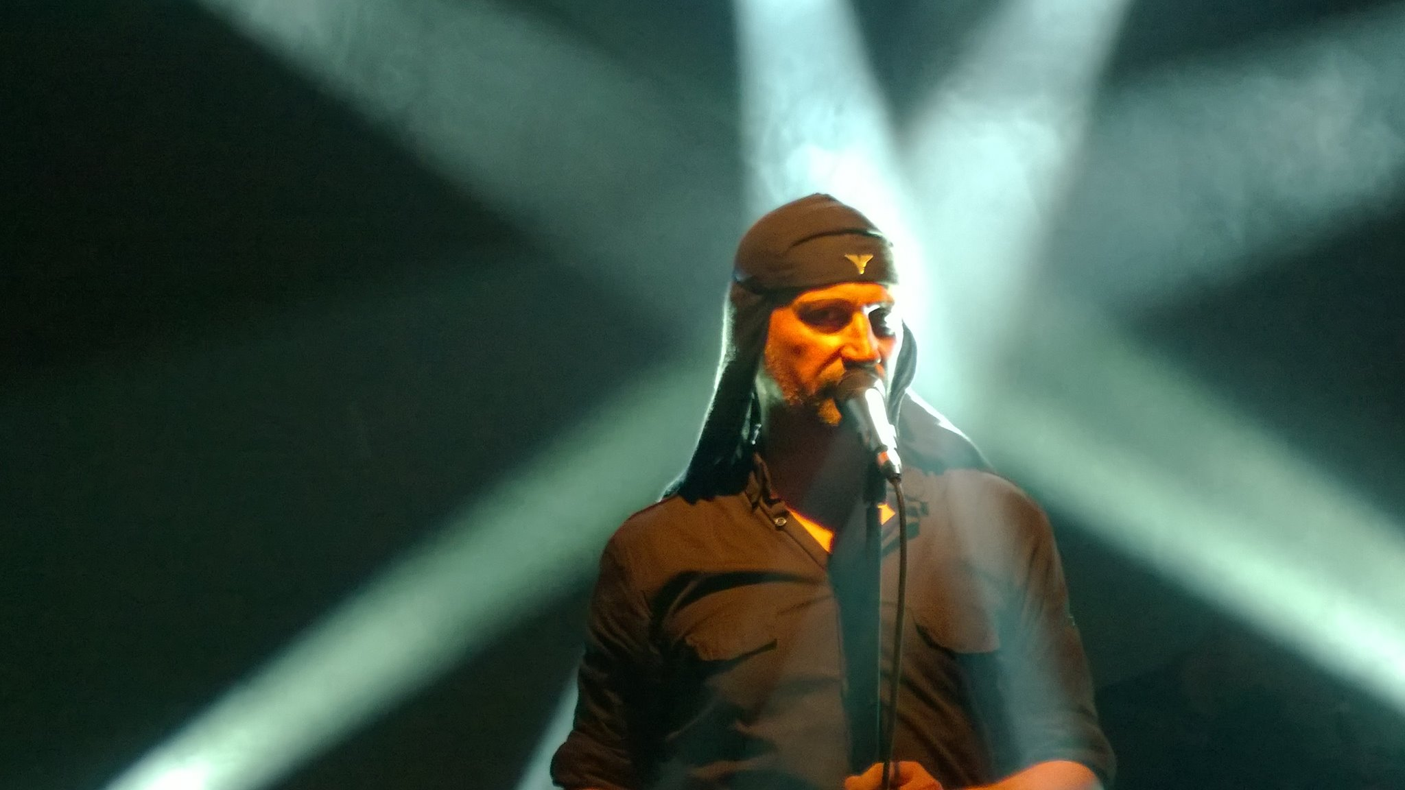 Milan Fras - Laibach Konzert in Köln